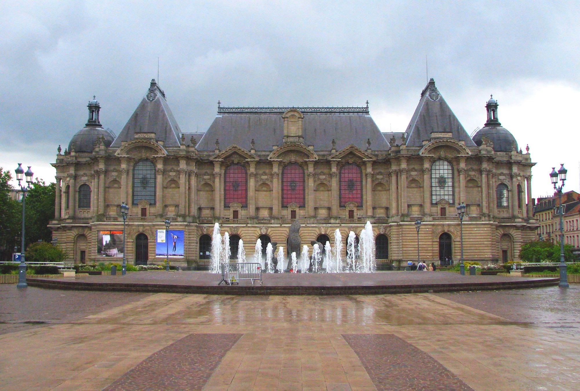 Place de la Republique, Musée Palais des Beaux Arts, Lille, France - Foto Wolfgang Pehlemann Steinberg IMG_1543